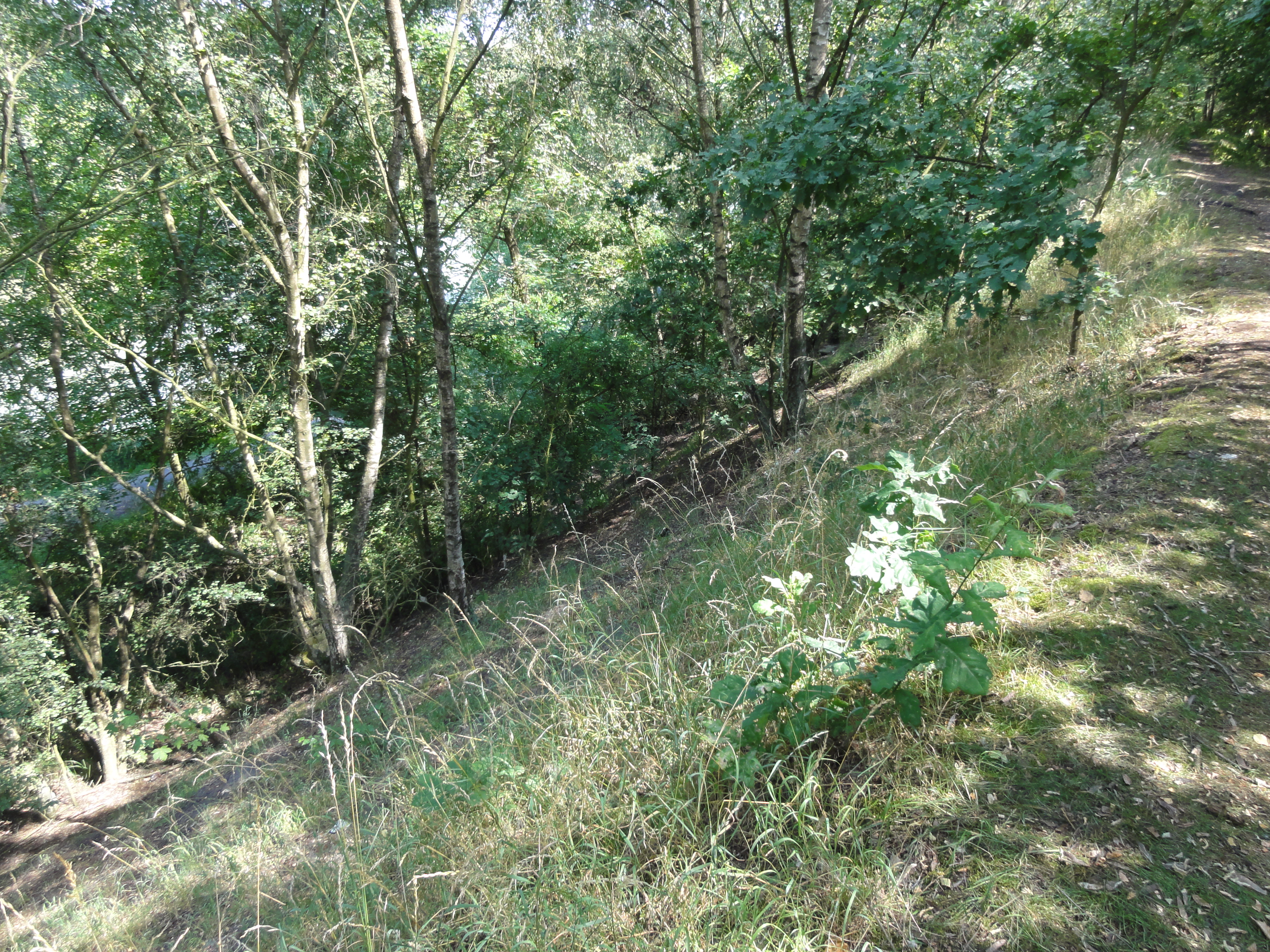 Terril n° 140 dit Marais du Vivier Ouest, Compagnie des mines de l'Escarpelle dans le bassin minier du Nord-Pas-de-Calais, Auby, Nord, Nord-Pas-de-Calais, France. Le terril no 140 est inscrit sur la liste du patrimoine mondial de l'Unesco le 30 juin 2012 et y constitue le site no 36.